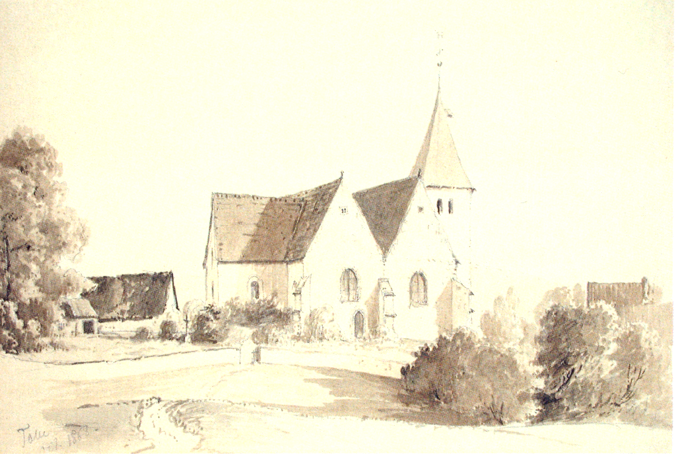 Zitiert aus der Bildbeschreibung von Heinrich Stiewe aus dem unten genannten Buch: Kirche in Talle, Nordansicht. Sepiazeichnung von 1868 (WV 825).